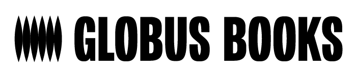 Логотип книжного магазина "Глобус" (2019)